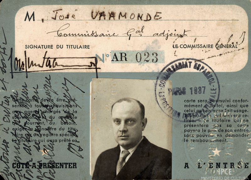 Carnet que acreditaba como personal organizador de uno de los pabellones de la Exposición Internacional de París.